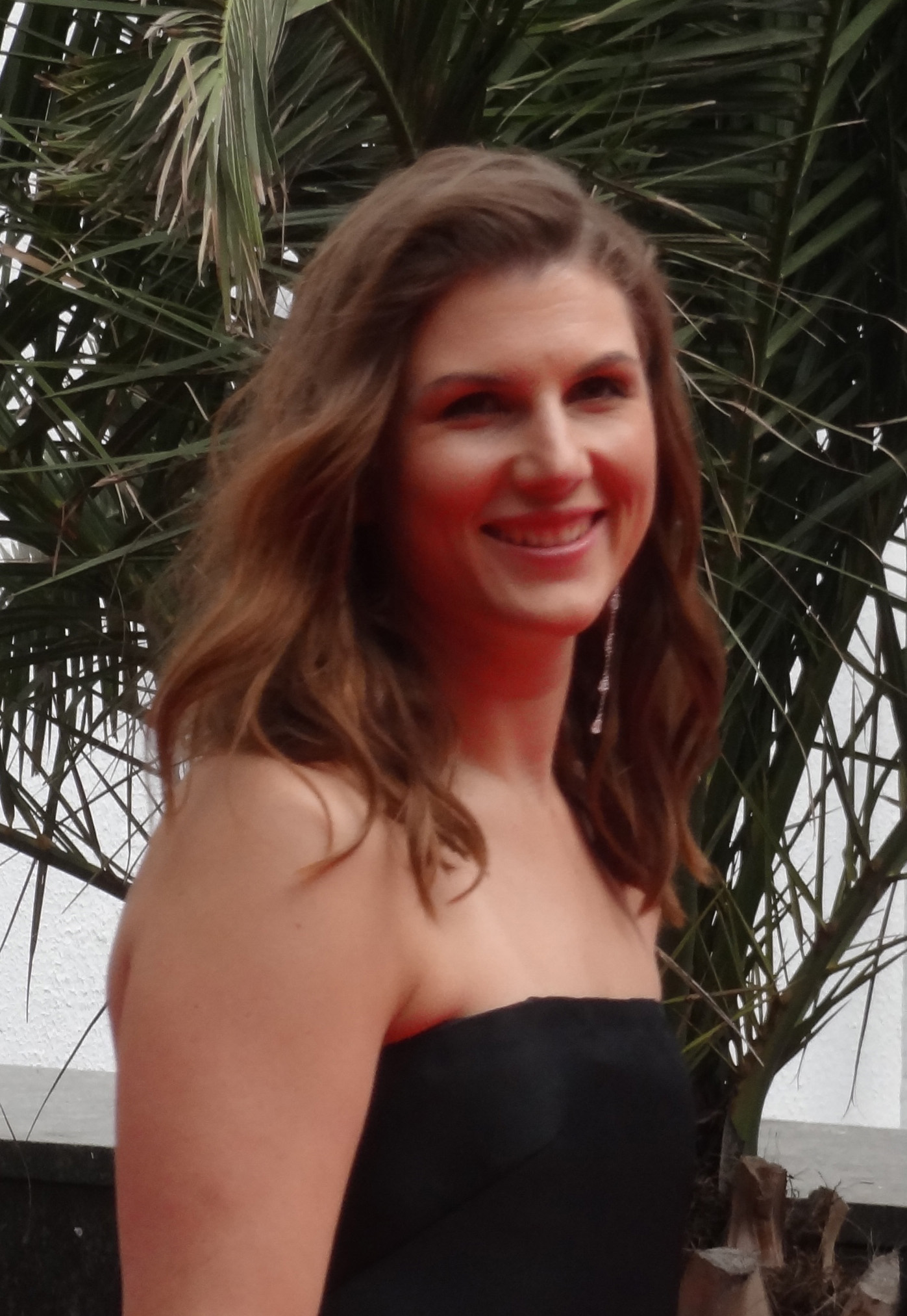 Марья́на Тимофе́евна Спива́к (род. 23 марта 1985, Москва) — российская актриса театра и кино. Получила широкую известность в 2017 году, сыграв главную роль в фильме Андрея Звягинцева «Нелюбовь».